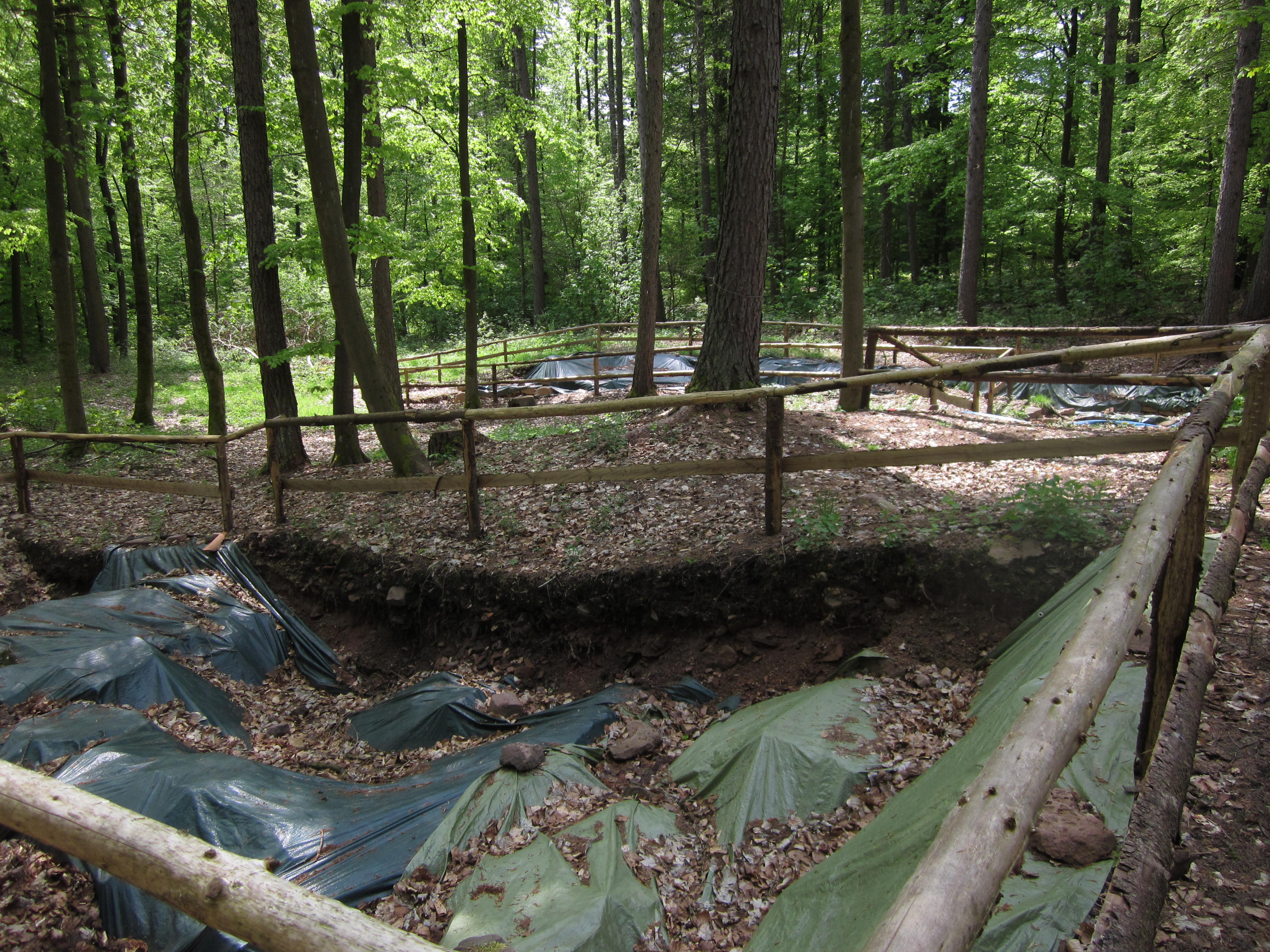 Auf dem Wanderweg "Birkenhainer Landstraße", Ausgrabung des Klosters